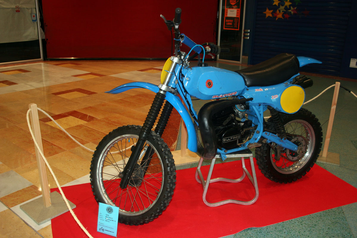 Bultaco Pursang MK-12 1978 250 cc.